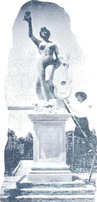 Estatua en jardines del Parva Domus ubicado en el barrio Punta Carretas de Montevideo.